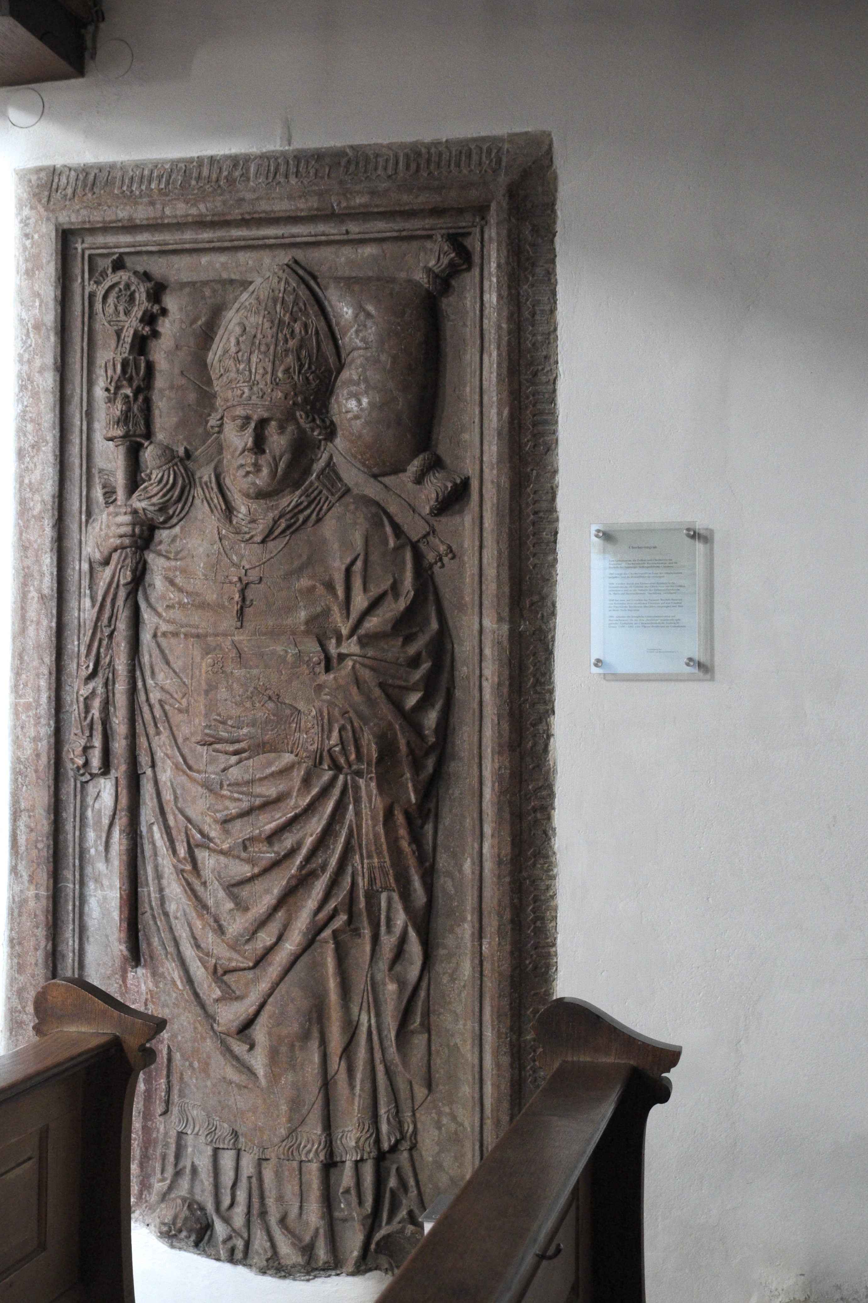 Katholische Pfarrkirche St. Johannes der Täufer in Breitbrunn am Chiemsee im Landkreis Rosenheim (Bayern/Deutschland), Grabplatte für den Bischof Ludwig Ebmer († 1516)